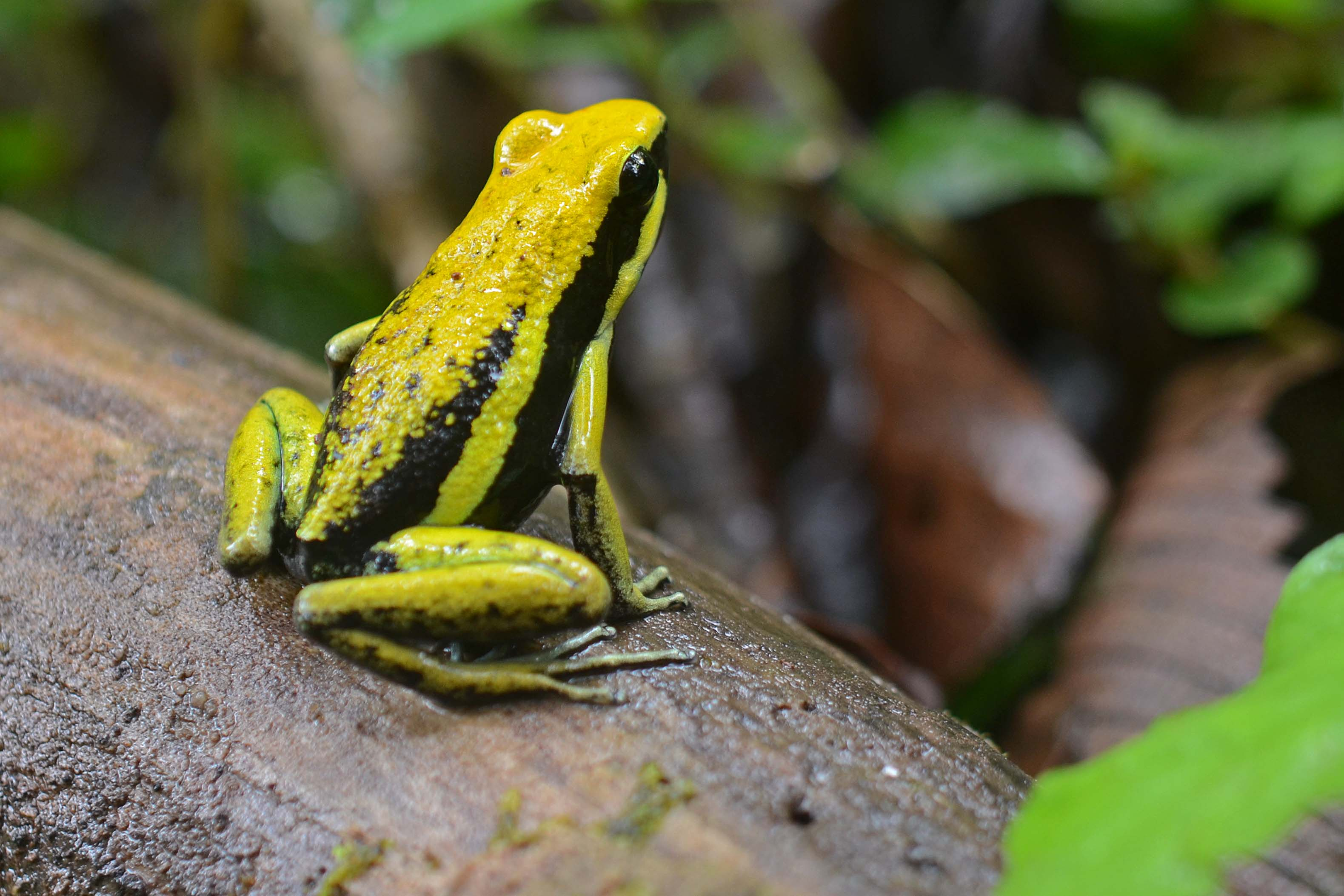 Tarapoto morph; Dendrobatidae: Ameerega bassleri